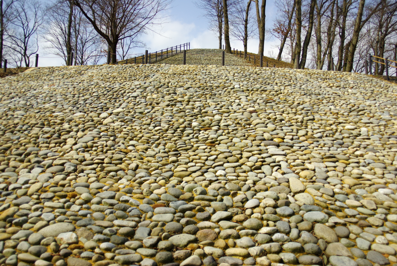 秋常山1号墳の復元された葺石。石川県能美市。